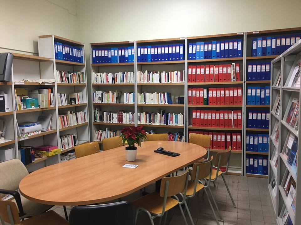 centre de documentation de la fédération laïc sur le planning familial. belgique